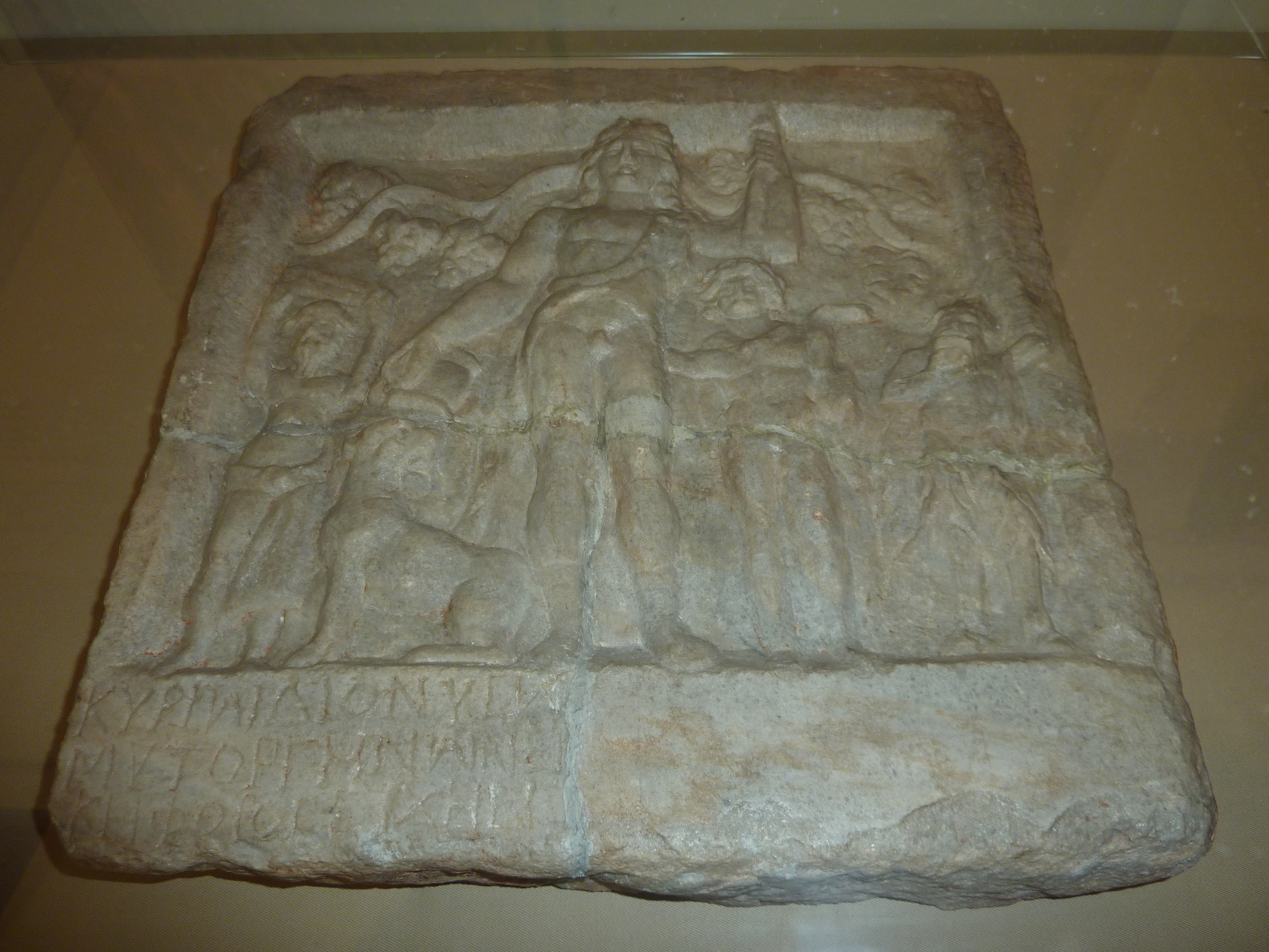 Релеф на Дионис, намерен в землището на с. Таваличево.